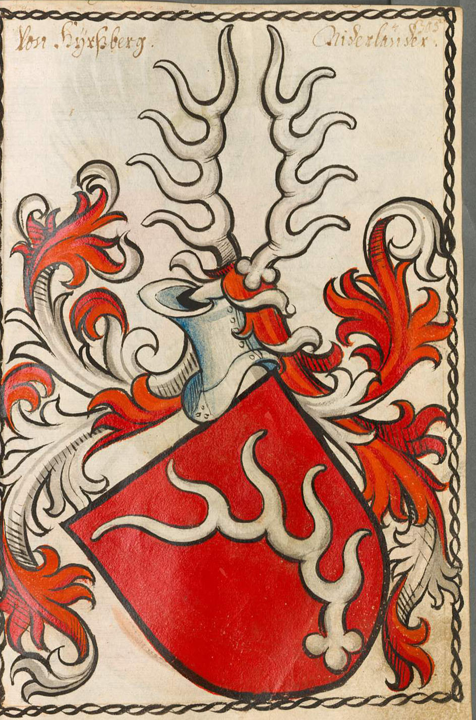 Scheibler'sches Wappenbuch , älterer Teil; Seite 305 Von Hyrßberg Niederländer